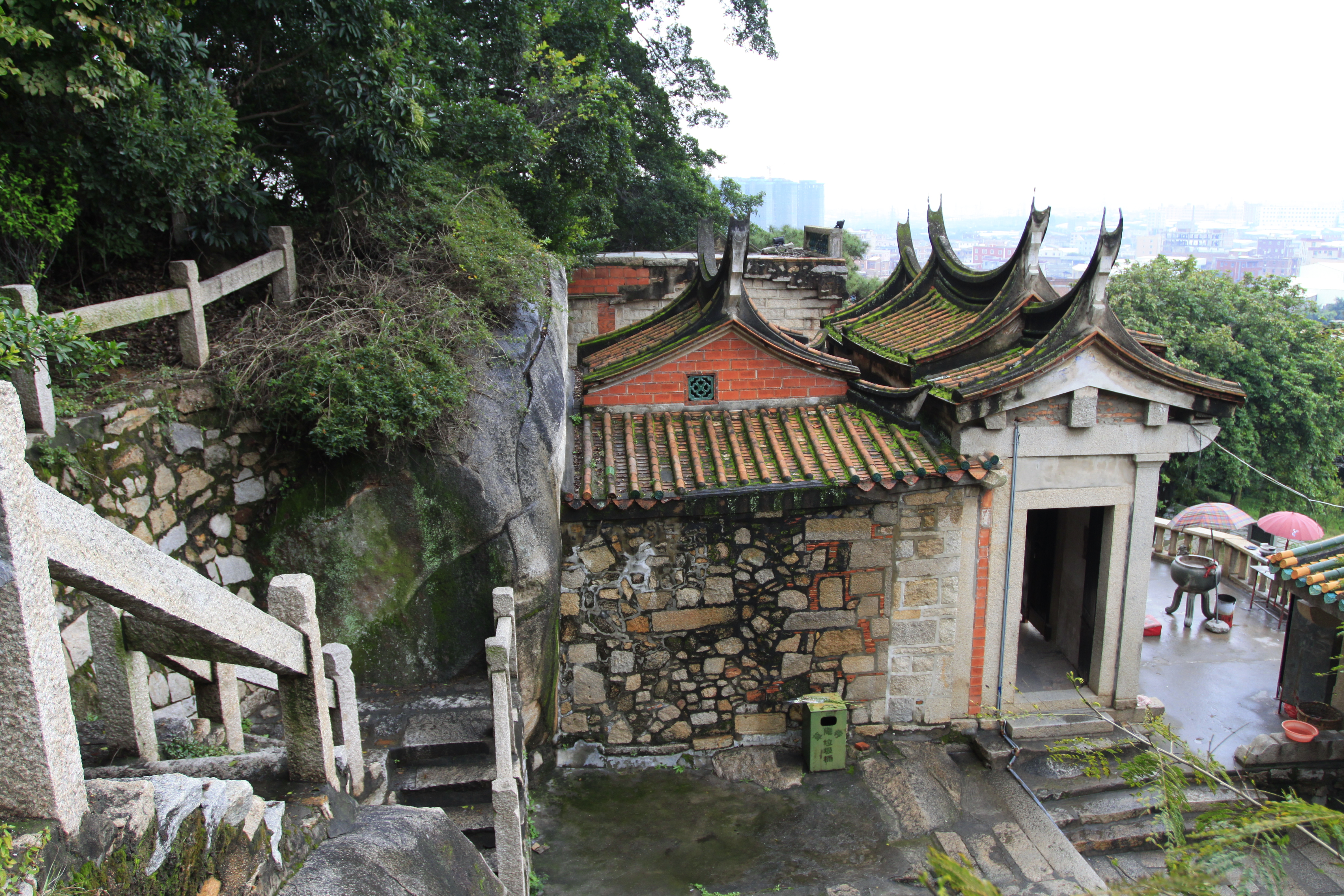 草庵，位于中国福建省晋江市，是全国重点文物保护单位。